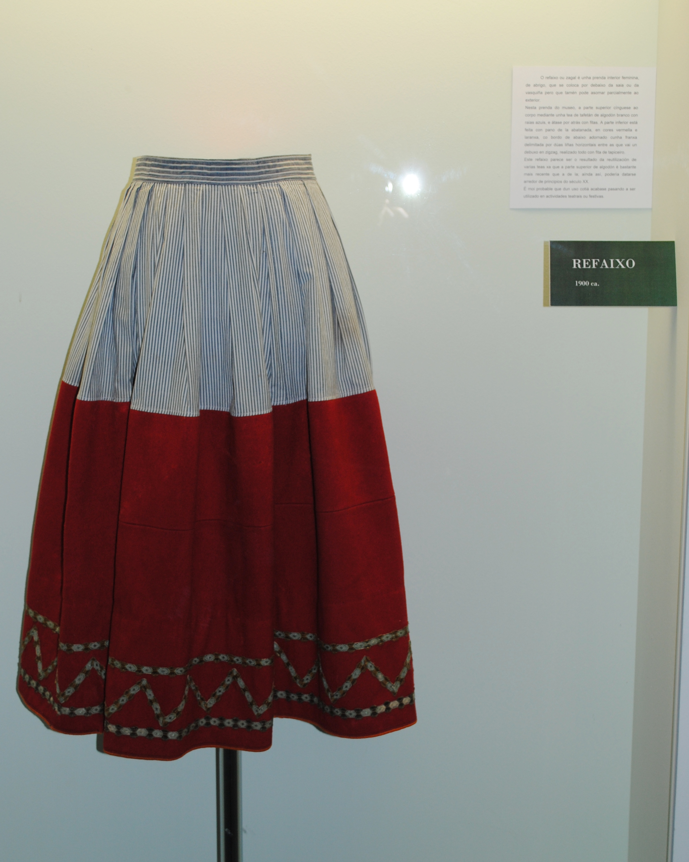 "O refaixo ou zagal é unha prenda interior feminina, de abrigo, que se coloca por debaixo da saia ou da vasquiña pero que tamén pode asomar parcialmente ao exterior. Nesta prenda do museo, a parte superior cínguese ao corpo mediante unha tea de tafetán de algodón branco con raias azuis, e átase por atrás con fitas. A parte interior está feita con pano de la abatanada, en cores vermella e laranxa, co bordo de abaixo adornado cunha franxa delimitada por dúas liñas horizontais entre as que vai un debuxo en zigzag, realizado todo con fita de tapiceiro. Este refaixo parece ser o resultado da reutilización de varias teas xa que a parte superior de algodón é bastante mais recente que a de la; aínda así, podería datarse arredor de principios do século XX. É moi probable que dun uso cotiá acabase pasando a ser utilizado en actividades teatrais ou festivas."